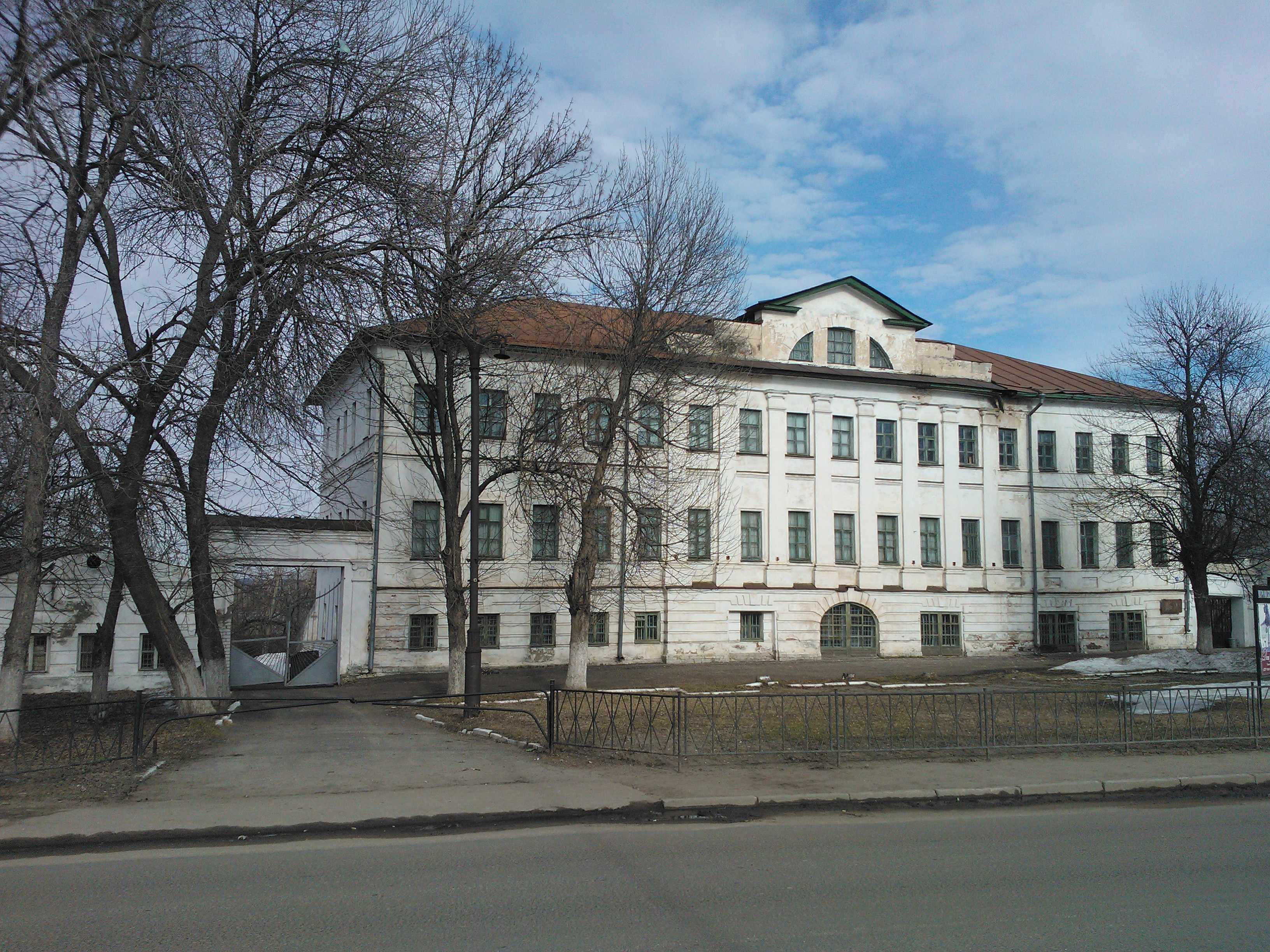 Здание муромского историко-художественного музея